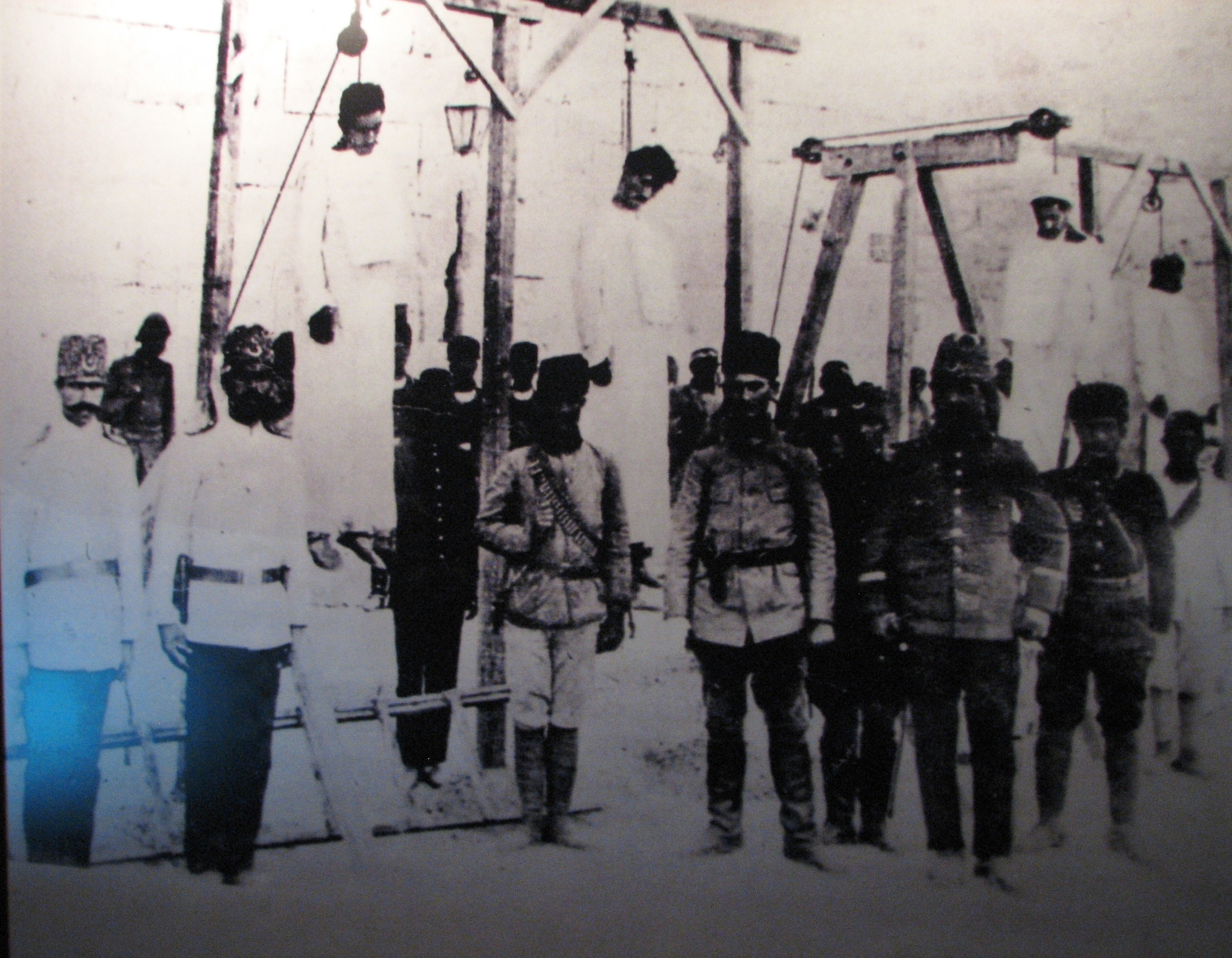 Armenian Genocide Museum-Institute in Yerevan, Armenia המוזיאון לרצח העם הארמני בירוואן בירת ארמניה Armenian doctors hanged in Aleppo Square, 1916 רופאים ארמניים שנתלו בככר באלפו בשנת 1916